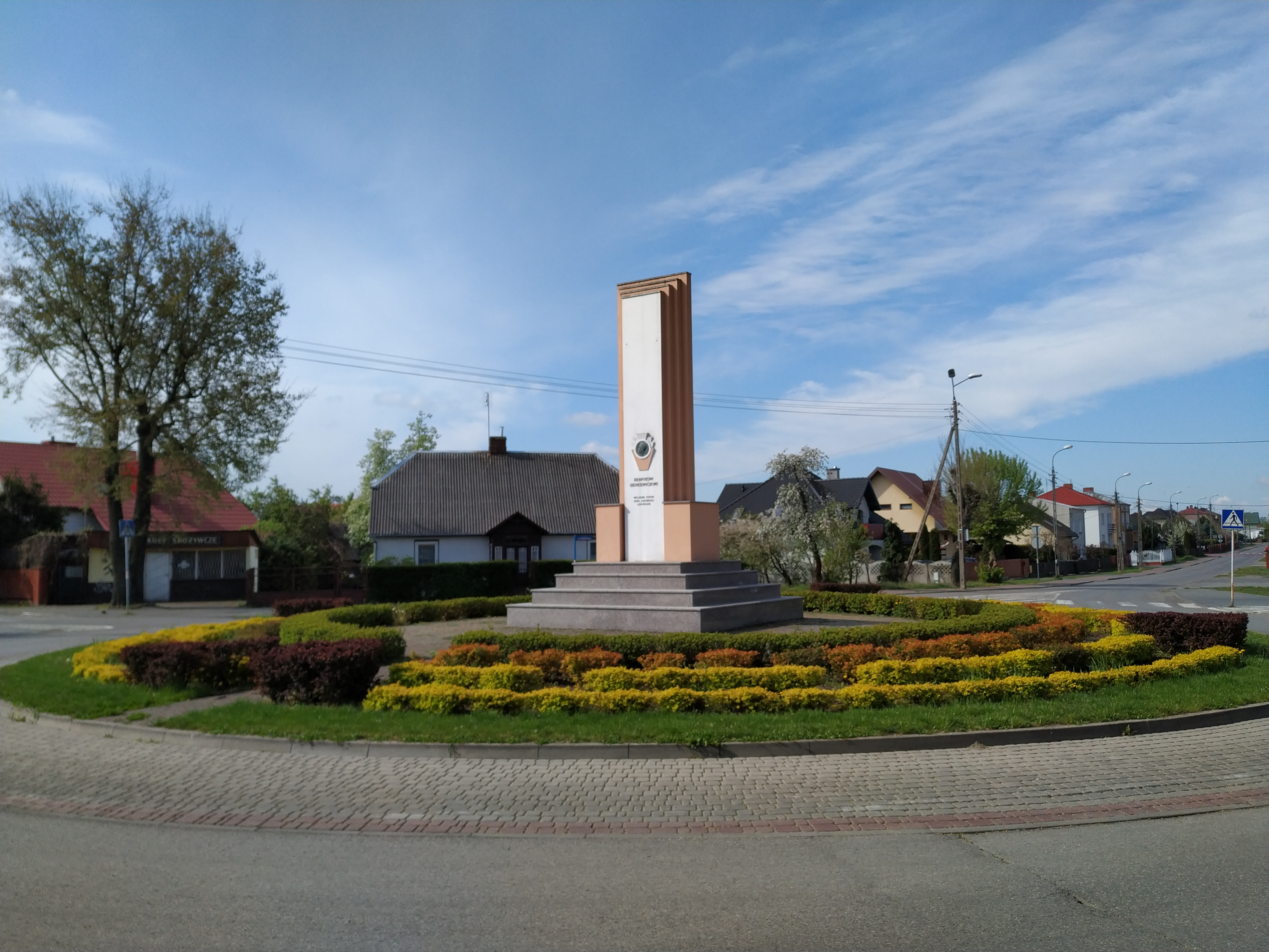 Pomnik H. Sienkiewicza na rondzie na ulicy nazwanej jego imieniem